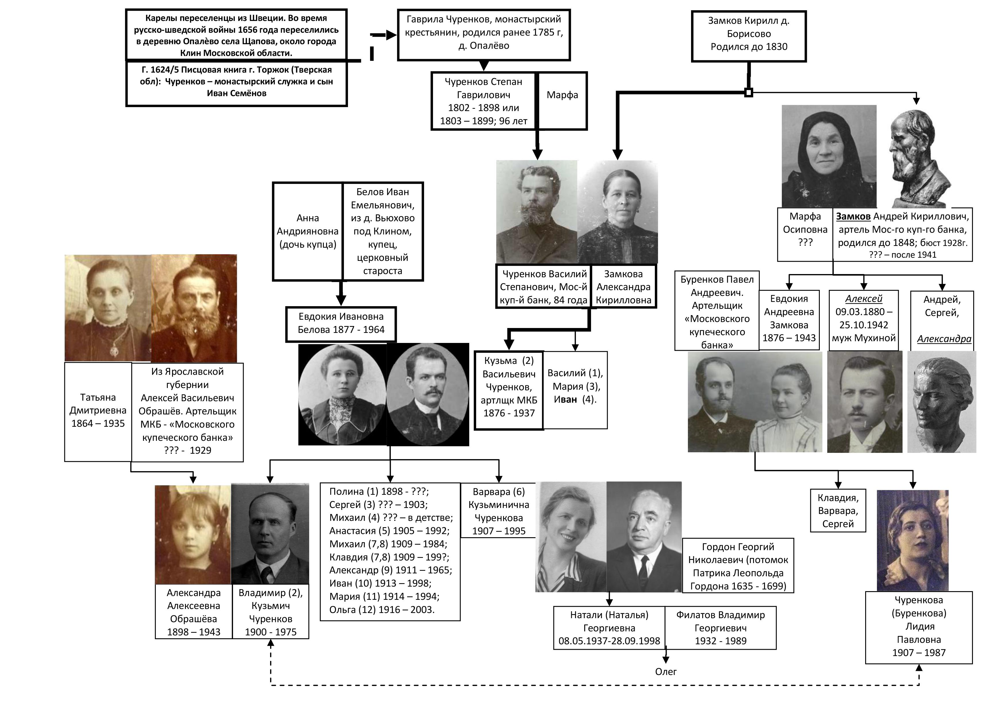 Дерево: А.А. Замков (муж В.И. Мухиной) и его родственники:Чуренковы